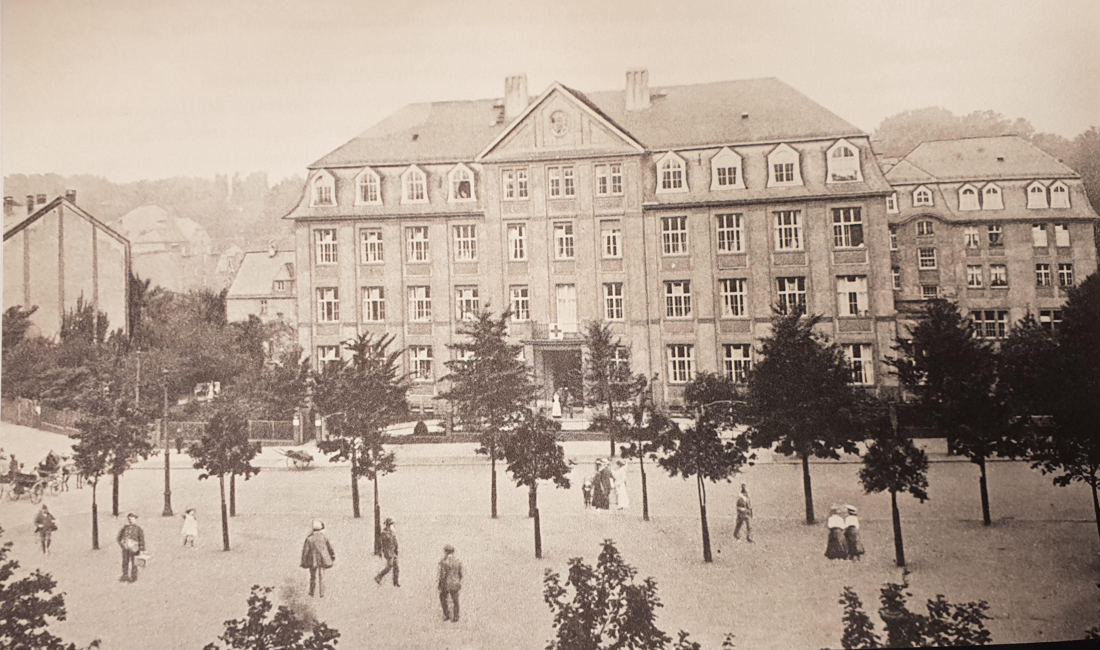 Bethanien Krankenhaus Frankfurt in der Straße im Prüfling in Frankfurt